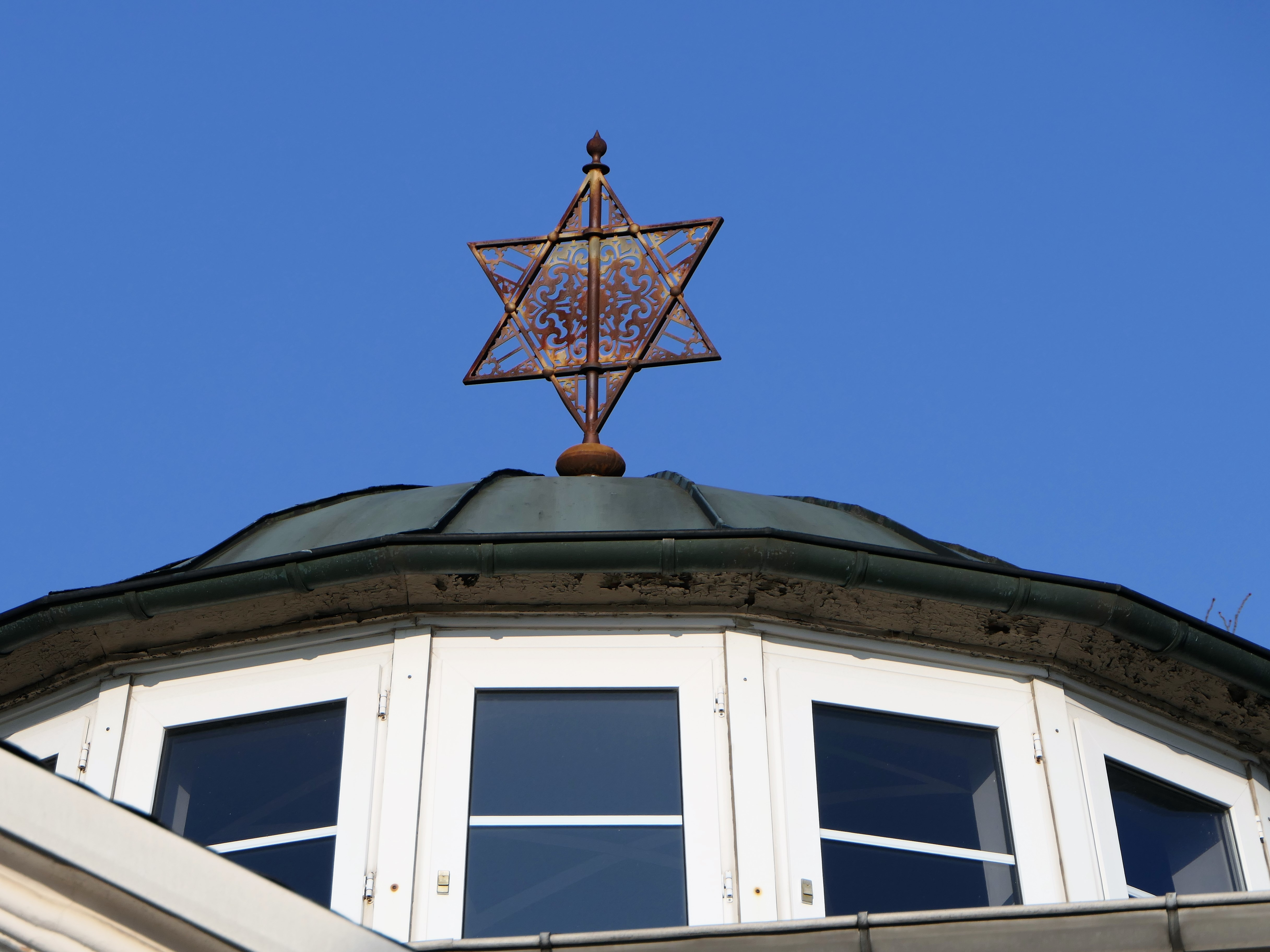 Davidstern der einstigen Semper-Synagoge (Alte Synagoge Dresden), heute auf der Kuppel der Totenhalle des Neuen Jüdischen Friedhofs in Dresden, Fiedlerstraße 3.